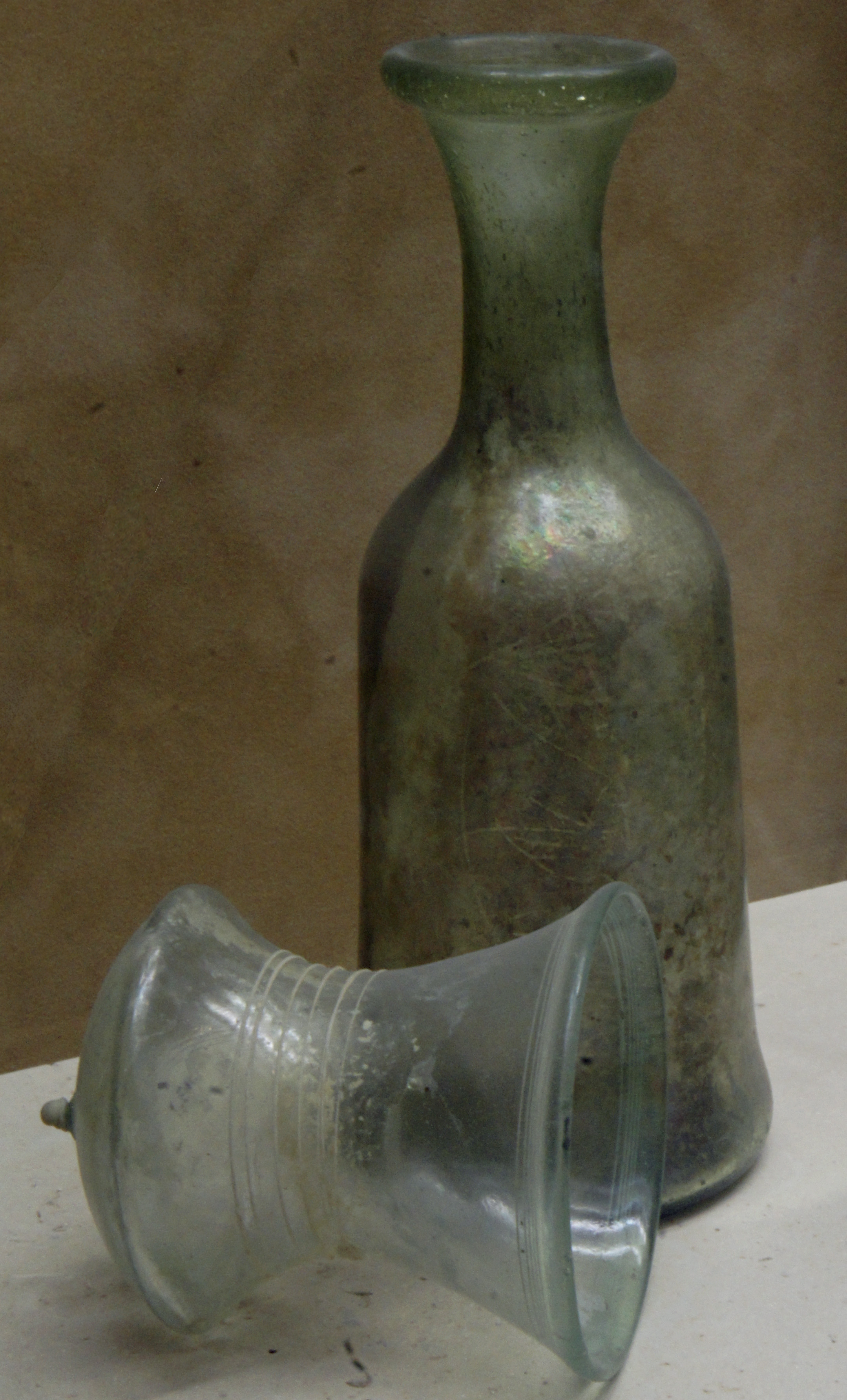 Trouvé à Chaumuzy des bouteilles en verre, actuellement en la Salle archéologie du Musée Saint-Remi .